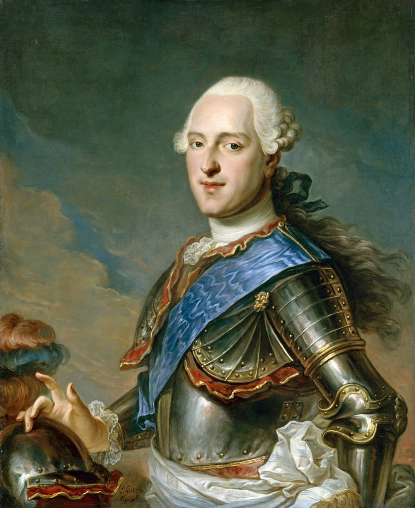 Franciszek Ksawery Wettin